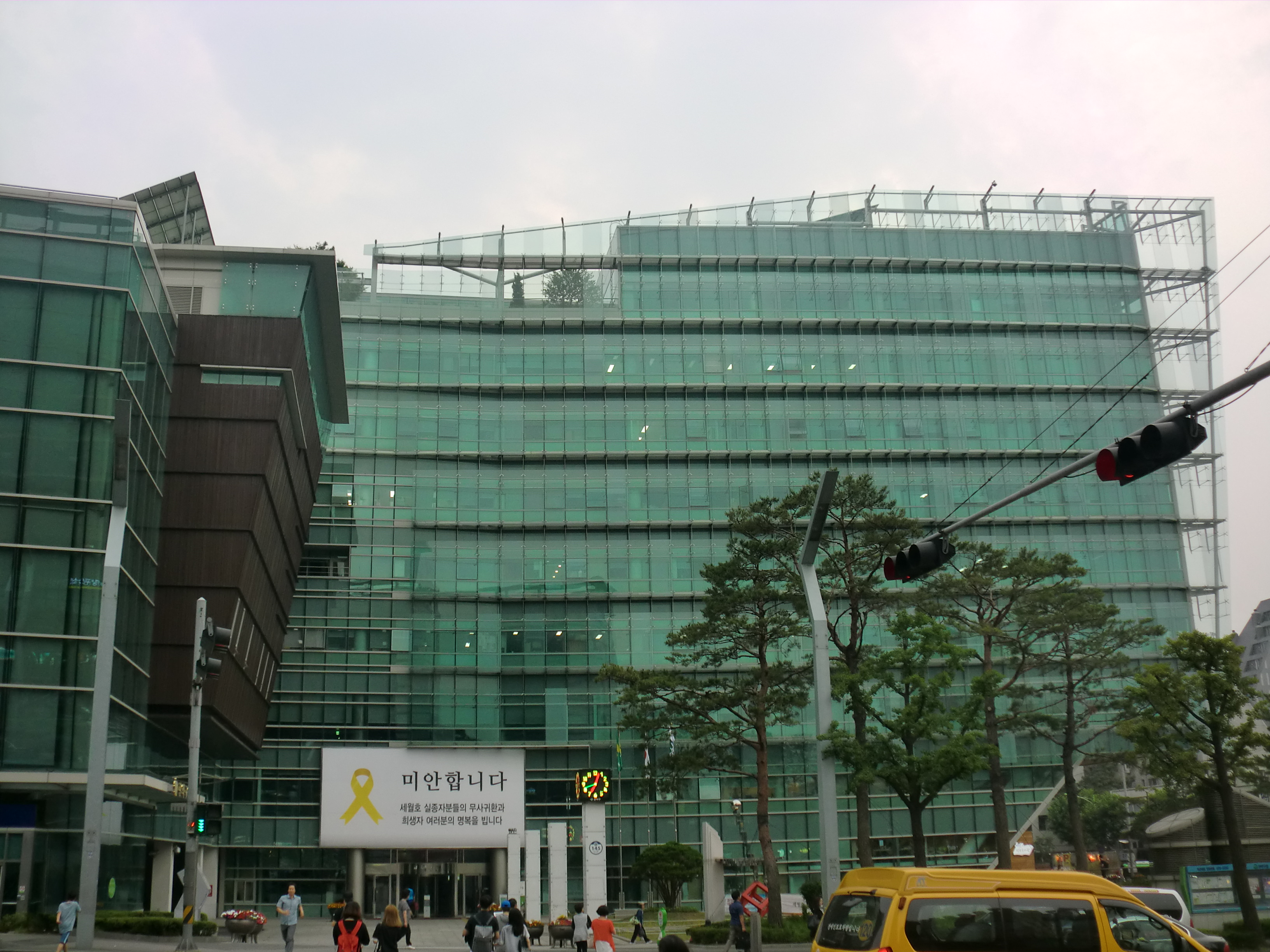 서울특별시 관악구에 있는 관악구청